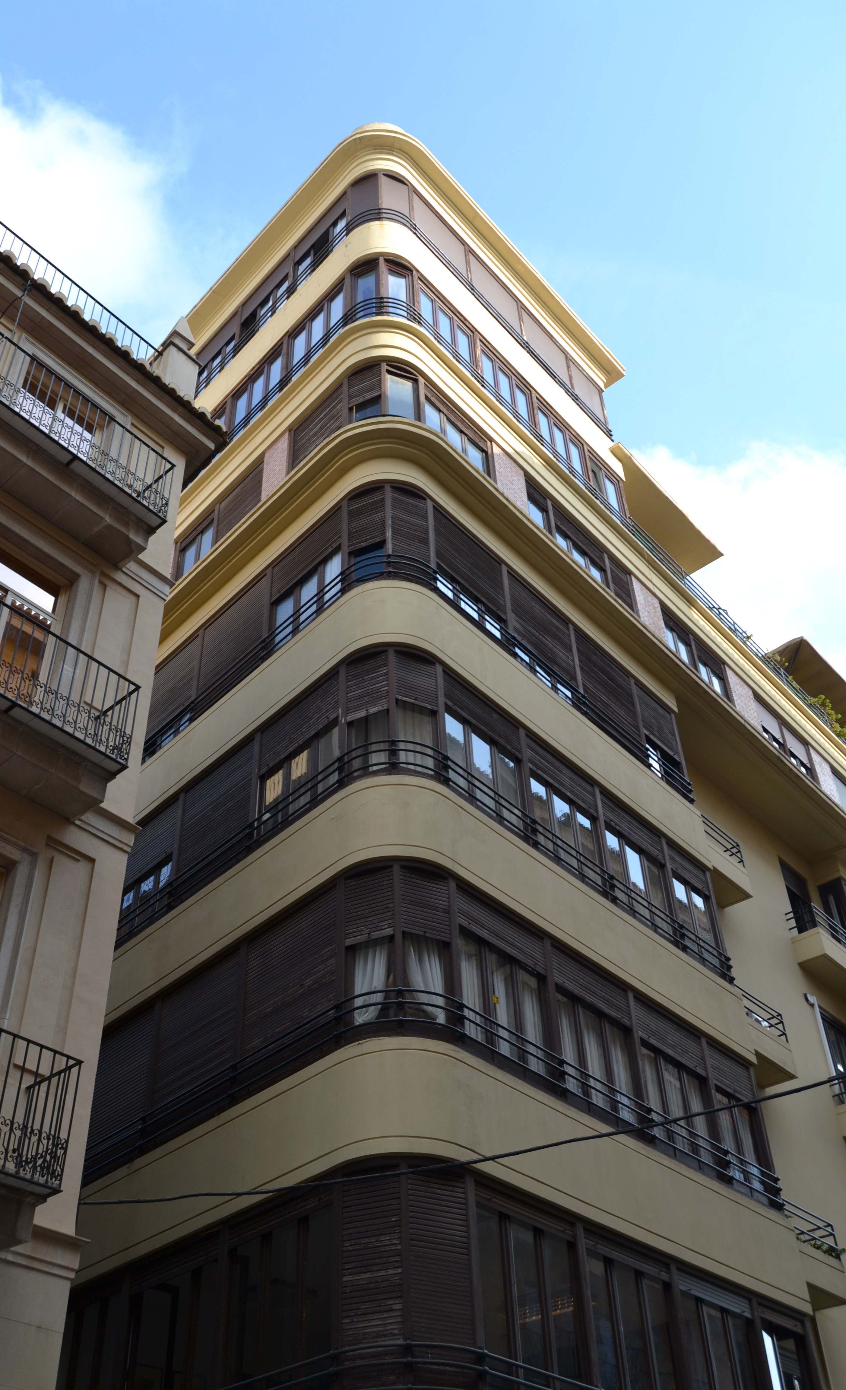 Edifici Cànovas de Luis Albert, València.